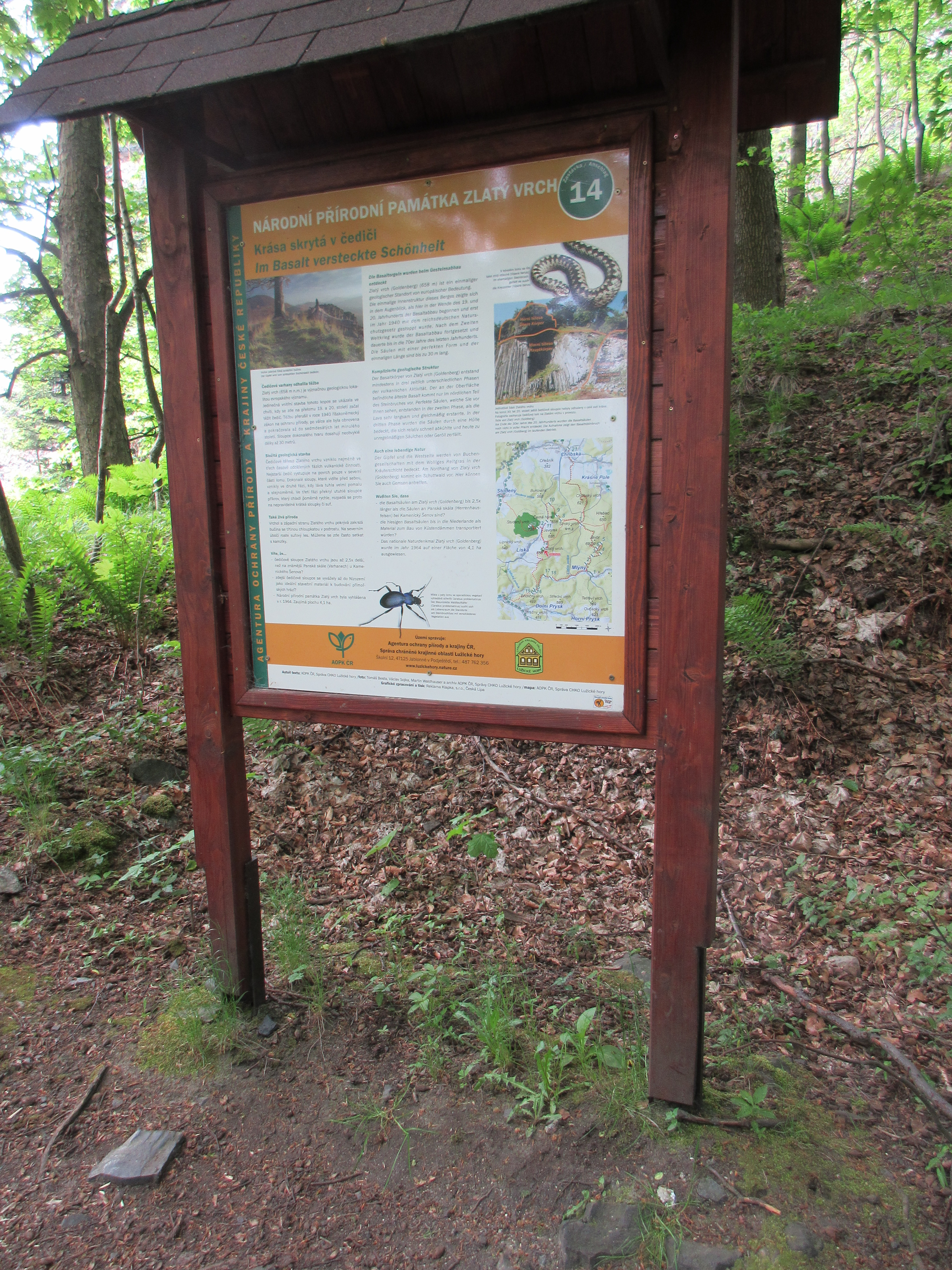 Tablo 14 Zlatý vrch